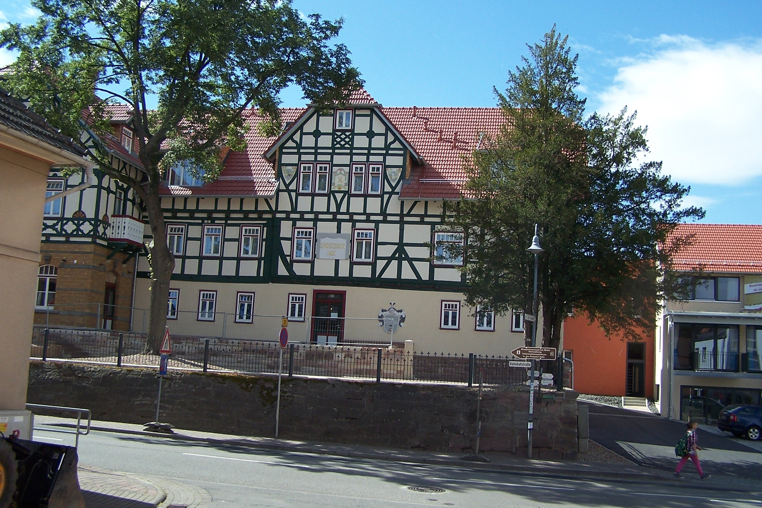 Das Hotel Sächsischer Hof in Dermbach vor der Wiedereröffnung.